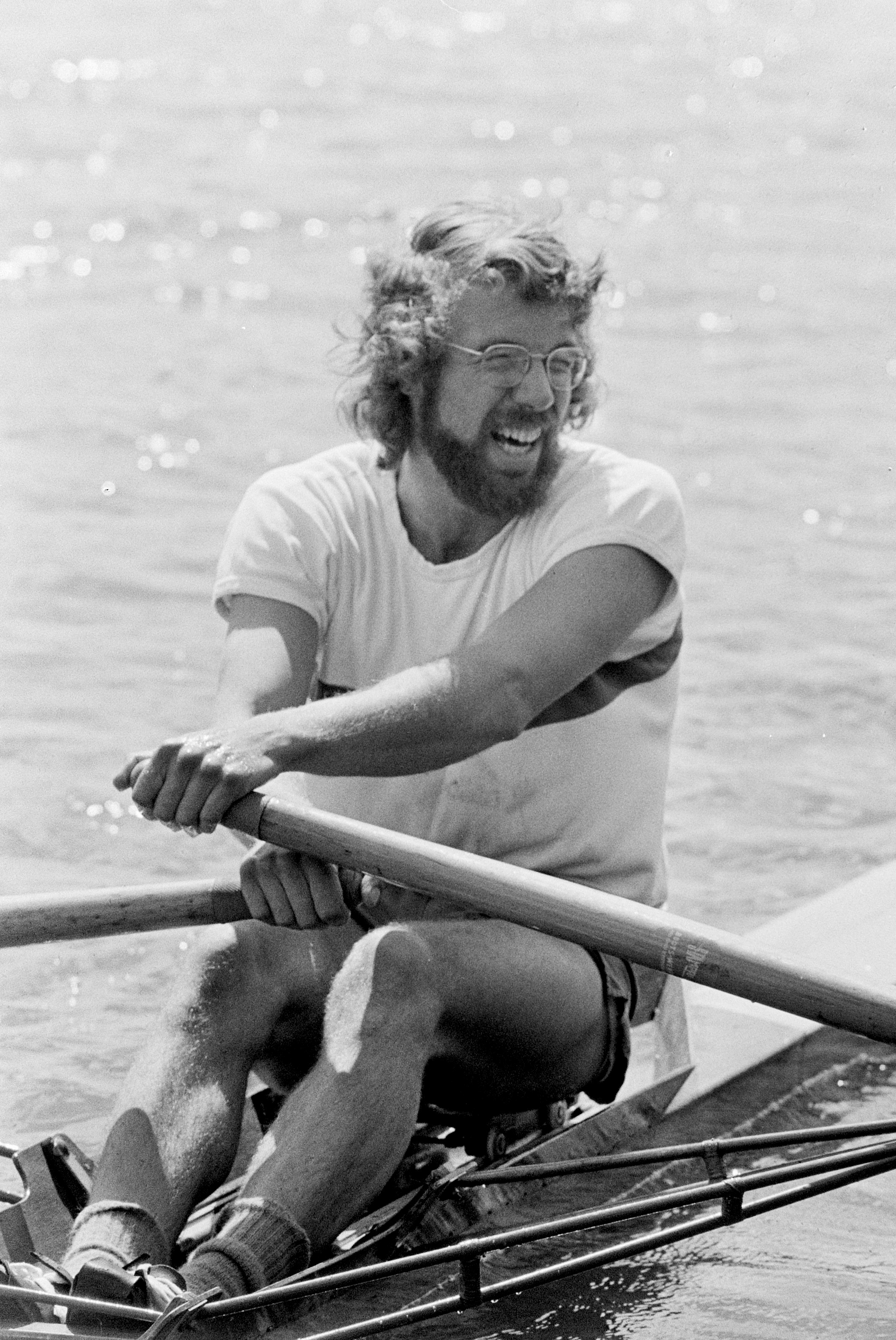 Nationale roeiwedstrijden op Bosbaan; Ronald Vervoort (Nautilus) winnaar elite skif heren